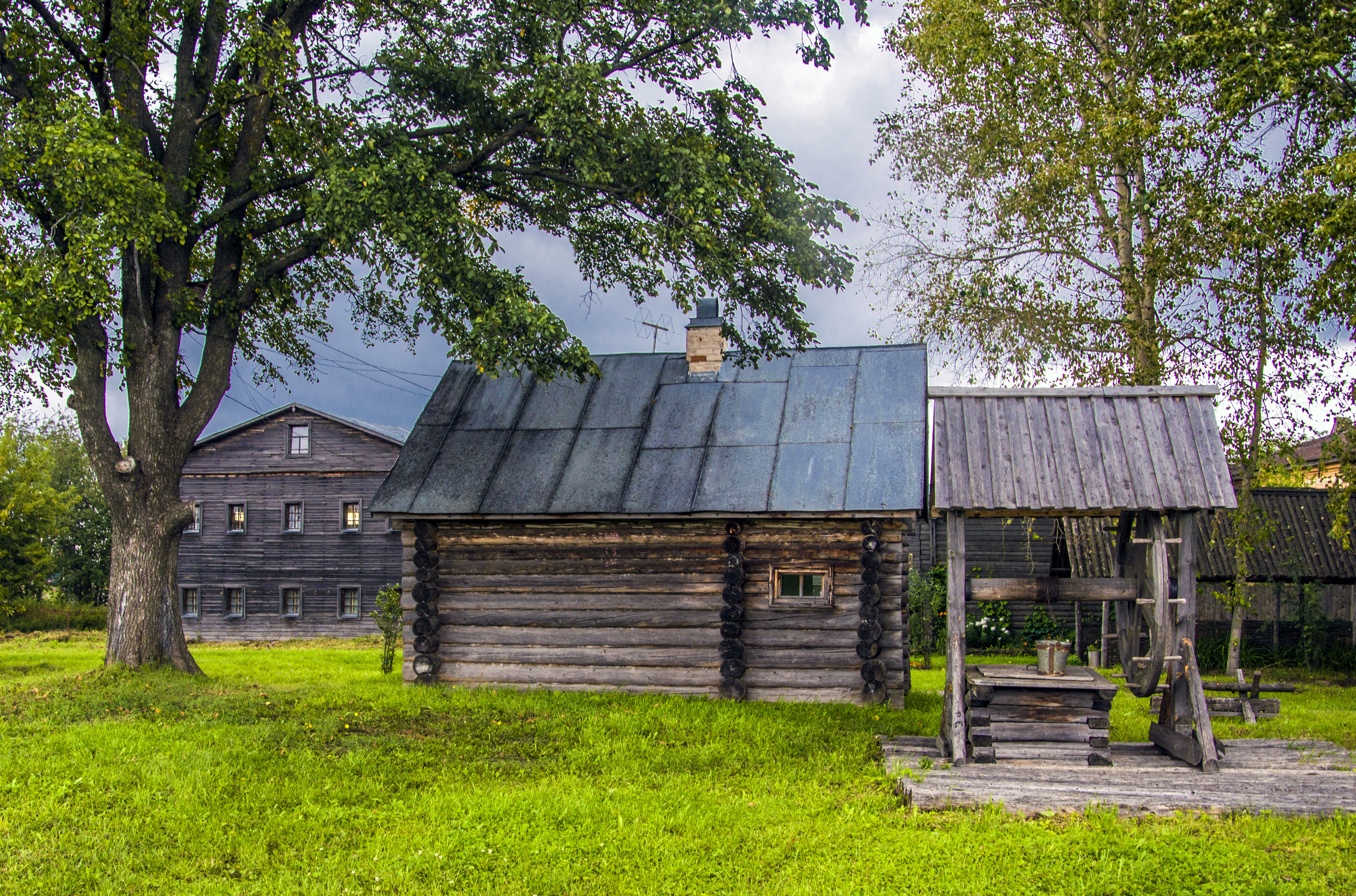 Дом, в котором родился и жил академик, герой социалистического труда хирург А.Н. Бакулев: Бакули, Слободской район, Кировская область